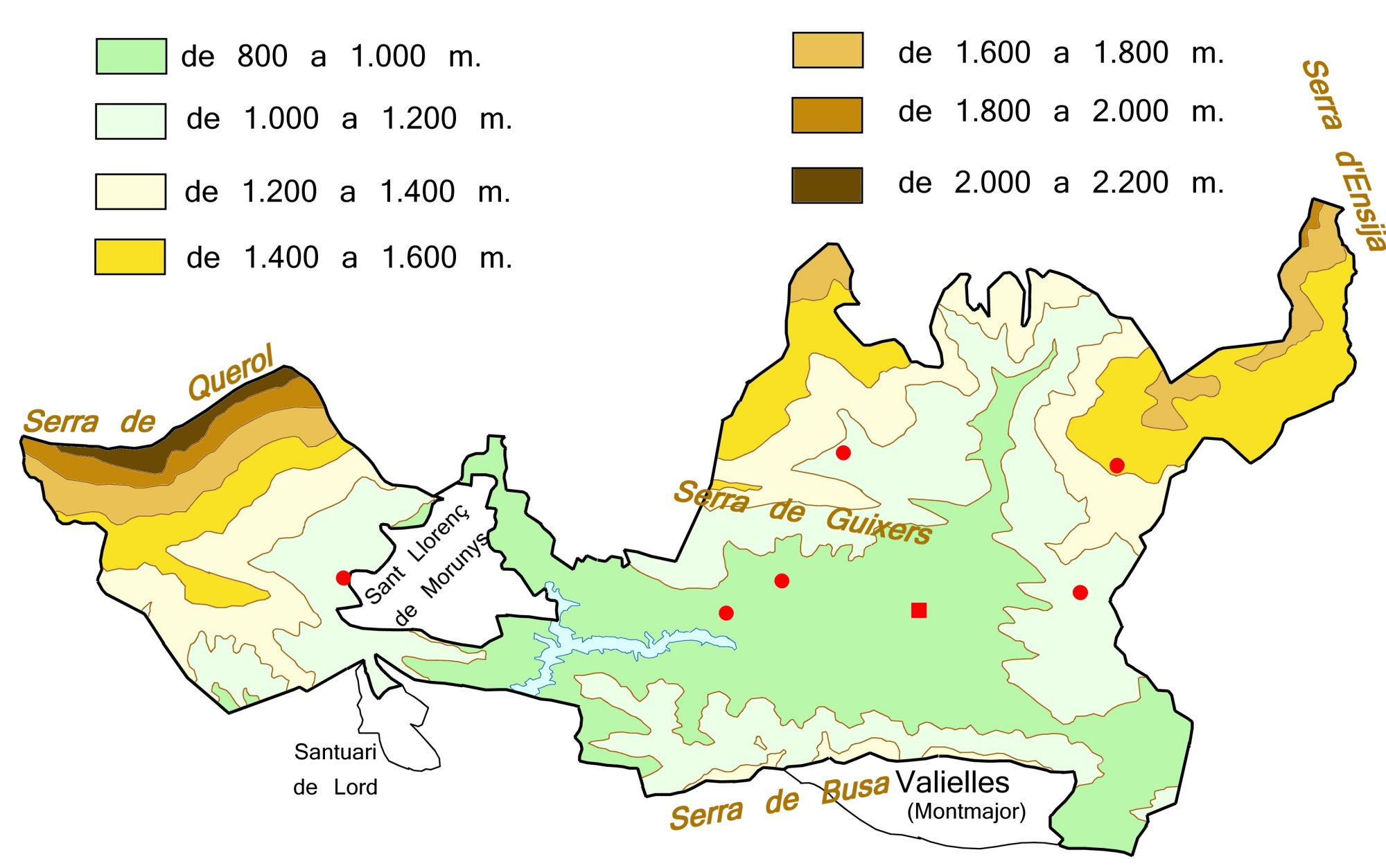 Mapa orogràfic del municipi de Guixers (Solsonès)